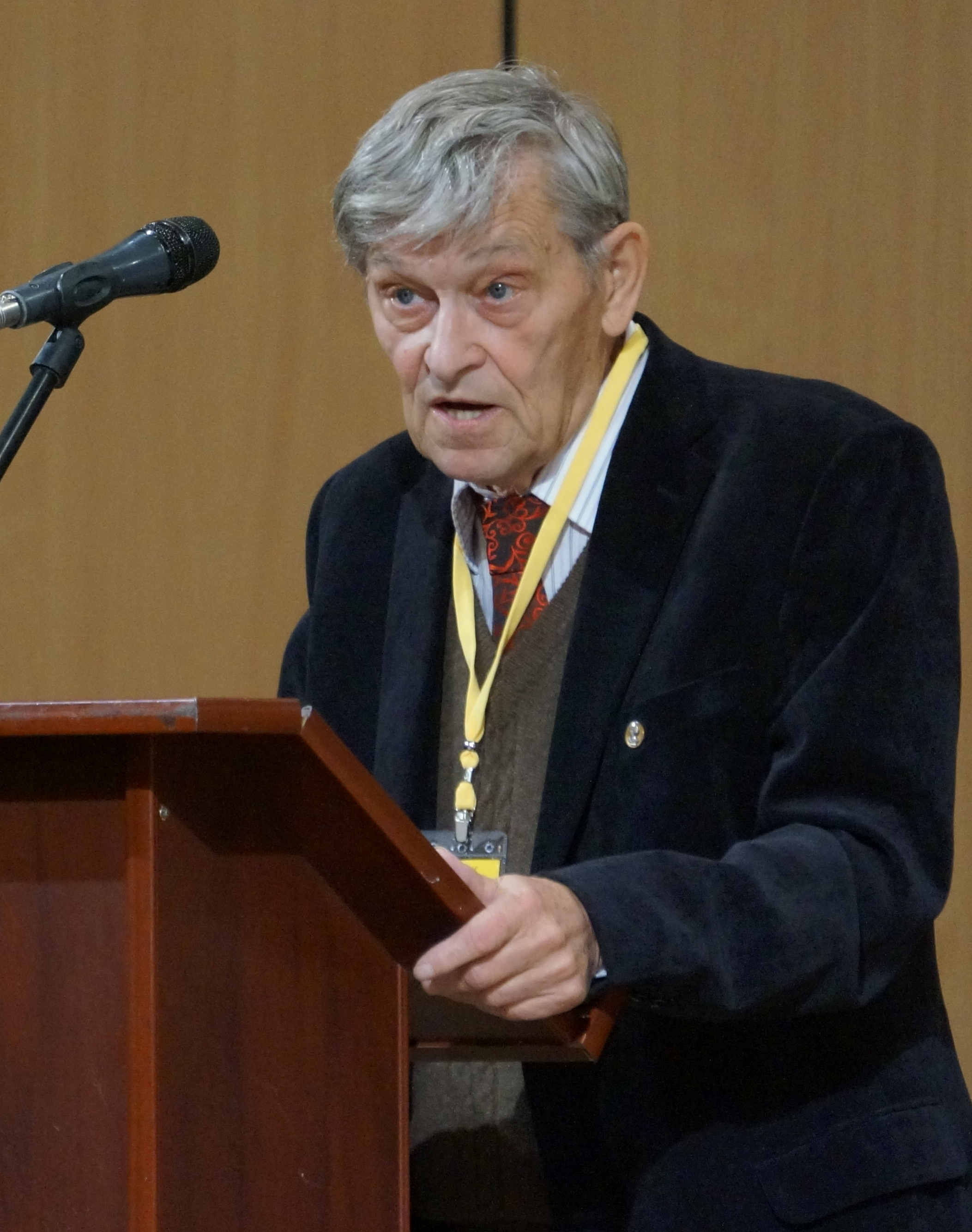 Рудольф Камелин. XIII съезд Русского ботанического общества. Тольятти, 2013 год.